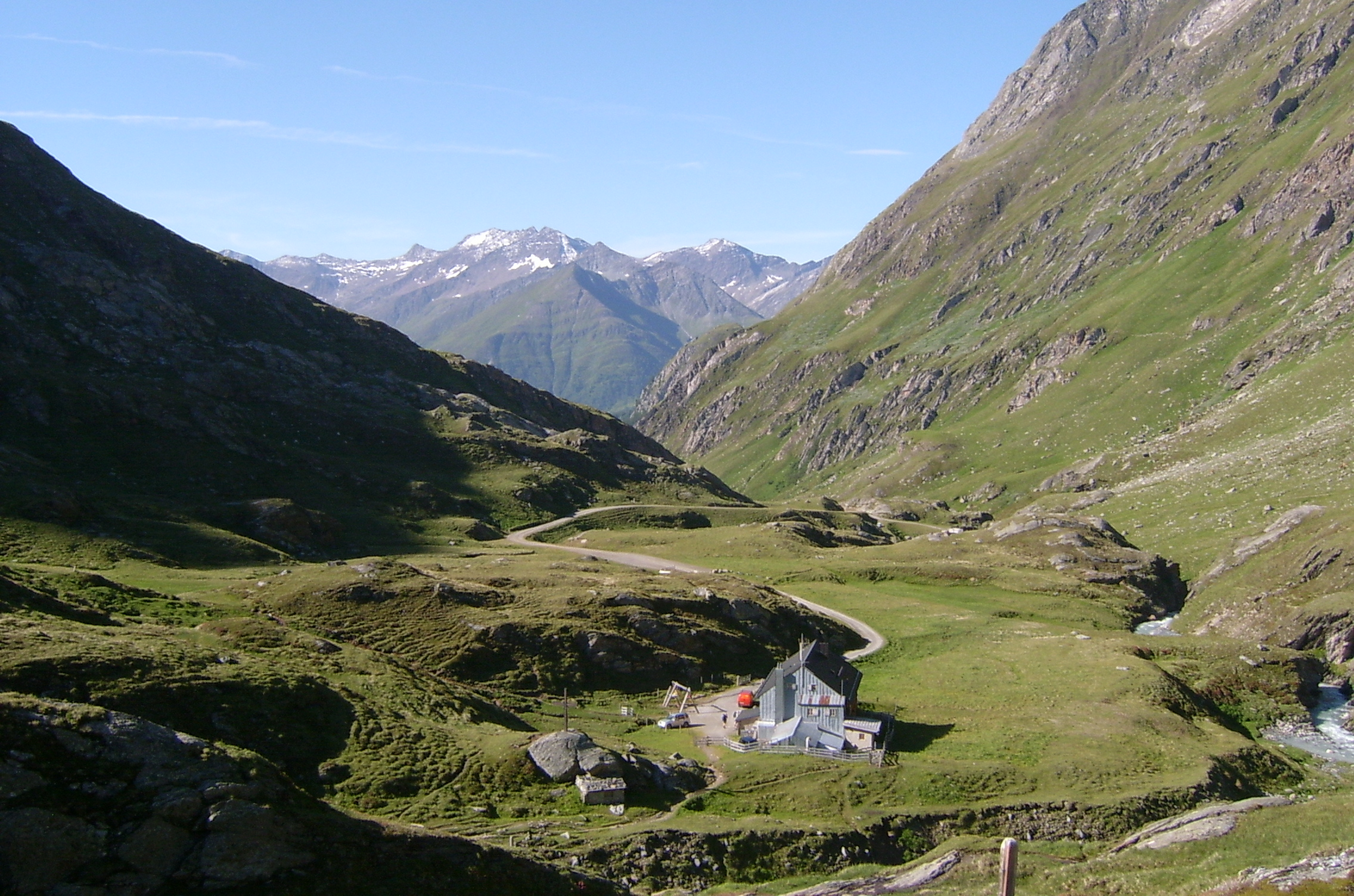 Die Johannishütte von oben betrachtet. Im Hintergrund die Lasöringgruppe.